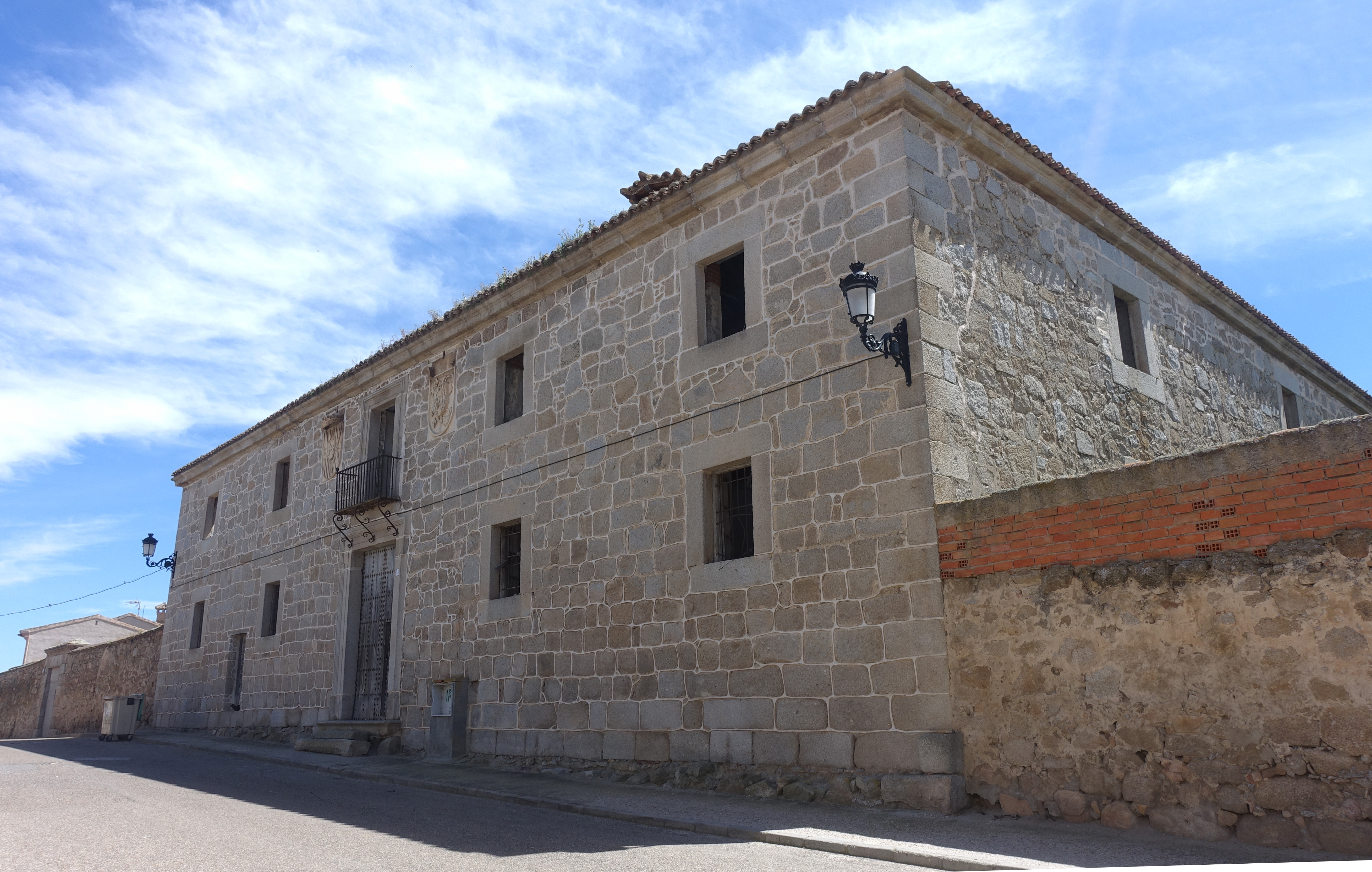 Antiguo Colegio de Gramáticos en Cuerva (Toledo, España).